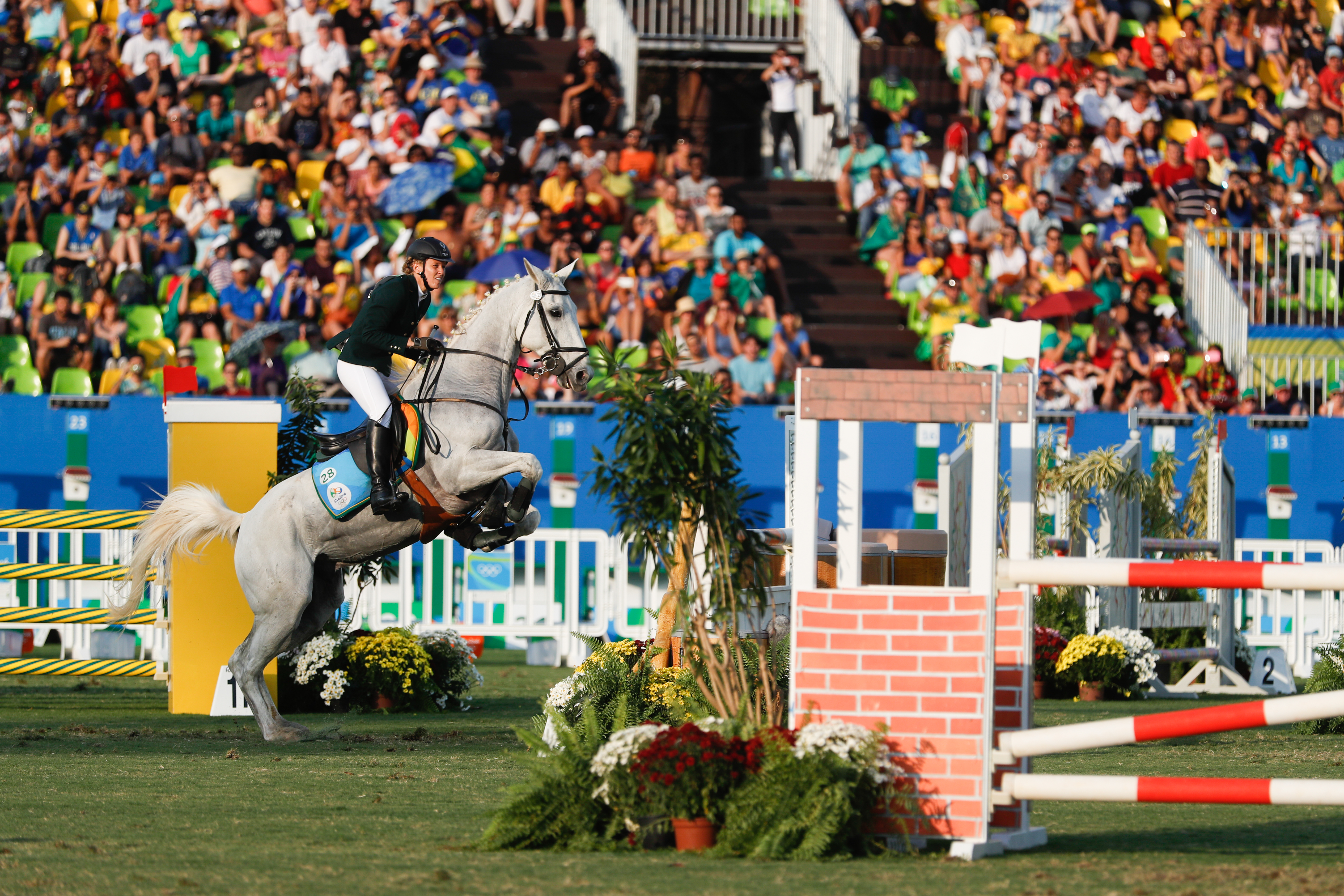 Rio de Janeiro - Brasileira Yane Maeques compete a final do pentatlo moderno dos Jogos Olímpicos Rio 2016 no Estádio de Deodoro (Fernando Frazão/Agência Brasil)